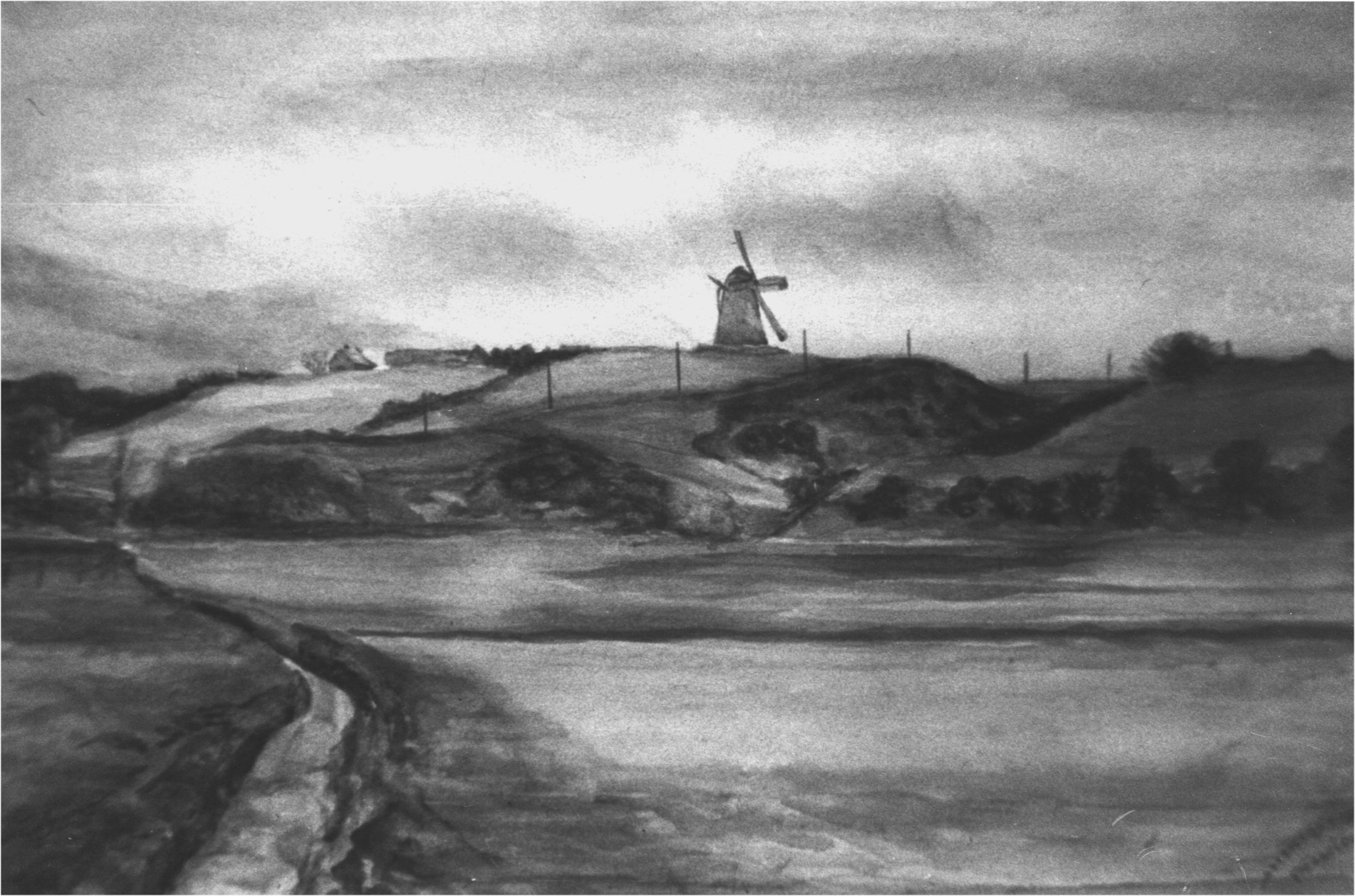 Essenbæk Mølle og Essenbækgaarden, Assentoft.